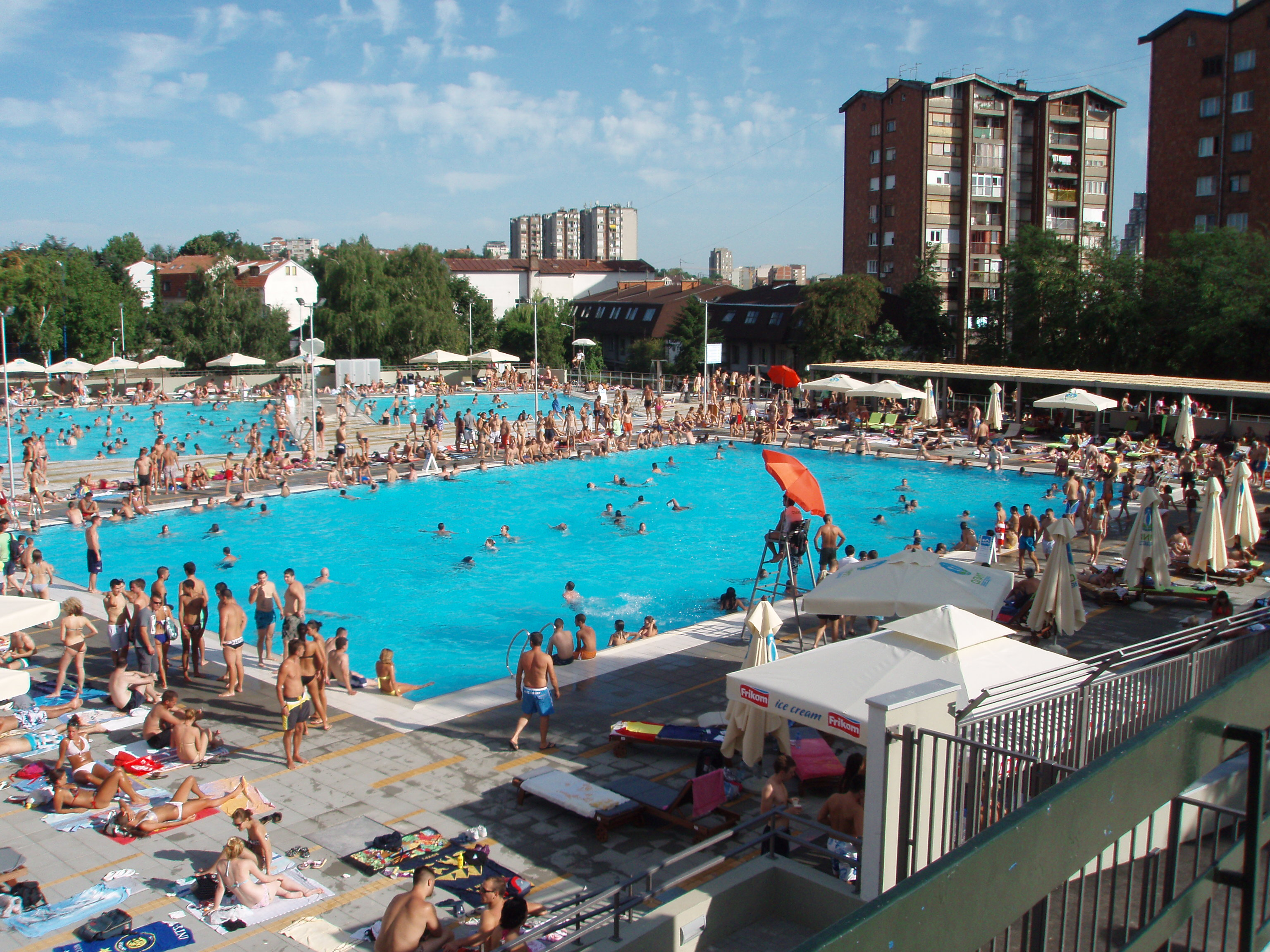 Sportski centar Olimp